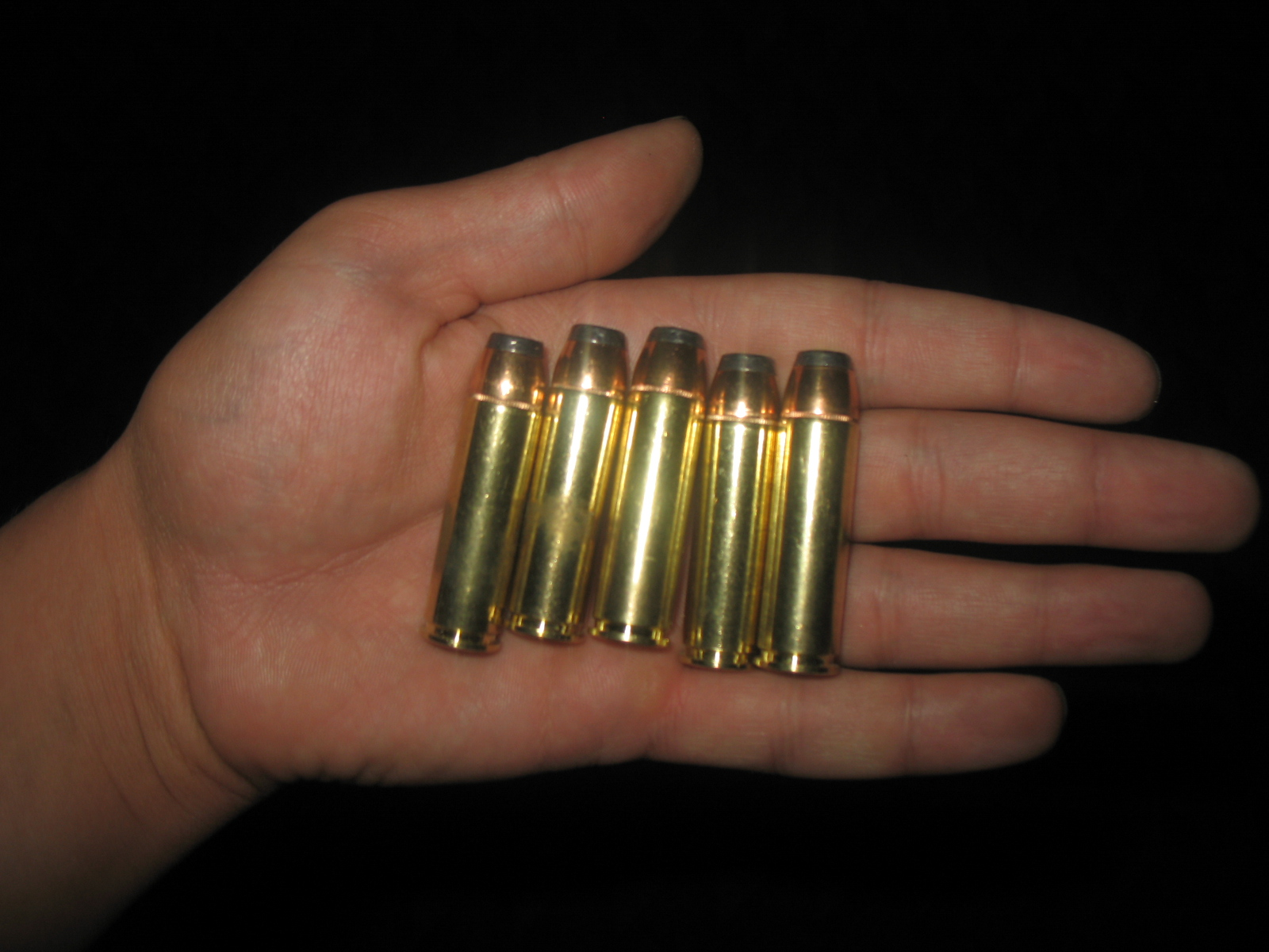 Einige .500S&W Patronen im Vergleich zu einer Hand, diese 5 Schuss entsprechen einer Ladung einer Model500 Revolvers von Smith&Wesson und bringen nach dem Abfeuern ein Gesamtgewicht von 142,82g an Projektilen ins Ziel